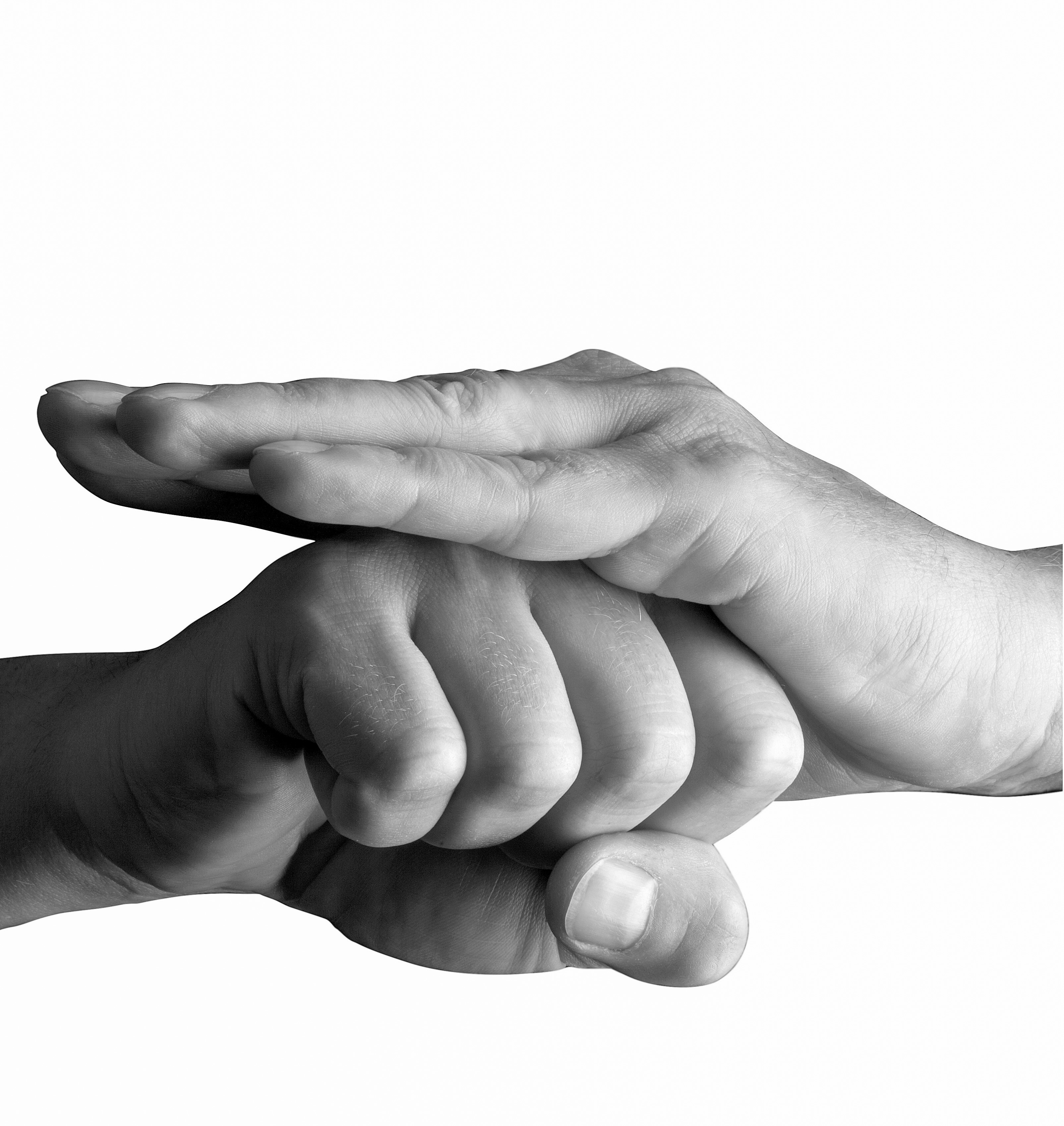 Salut for Kenpo